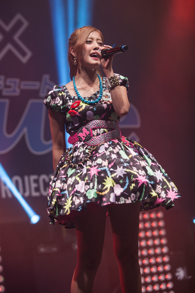 Berryz Kobo x °C-ute